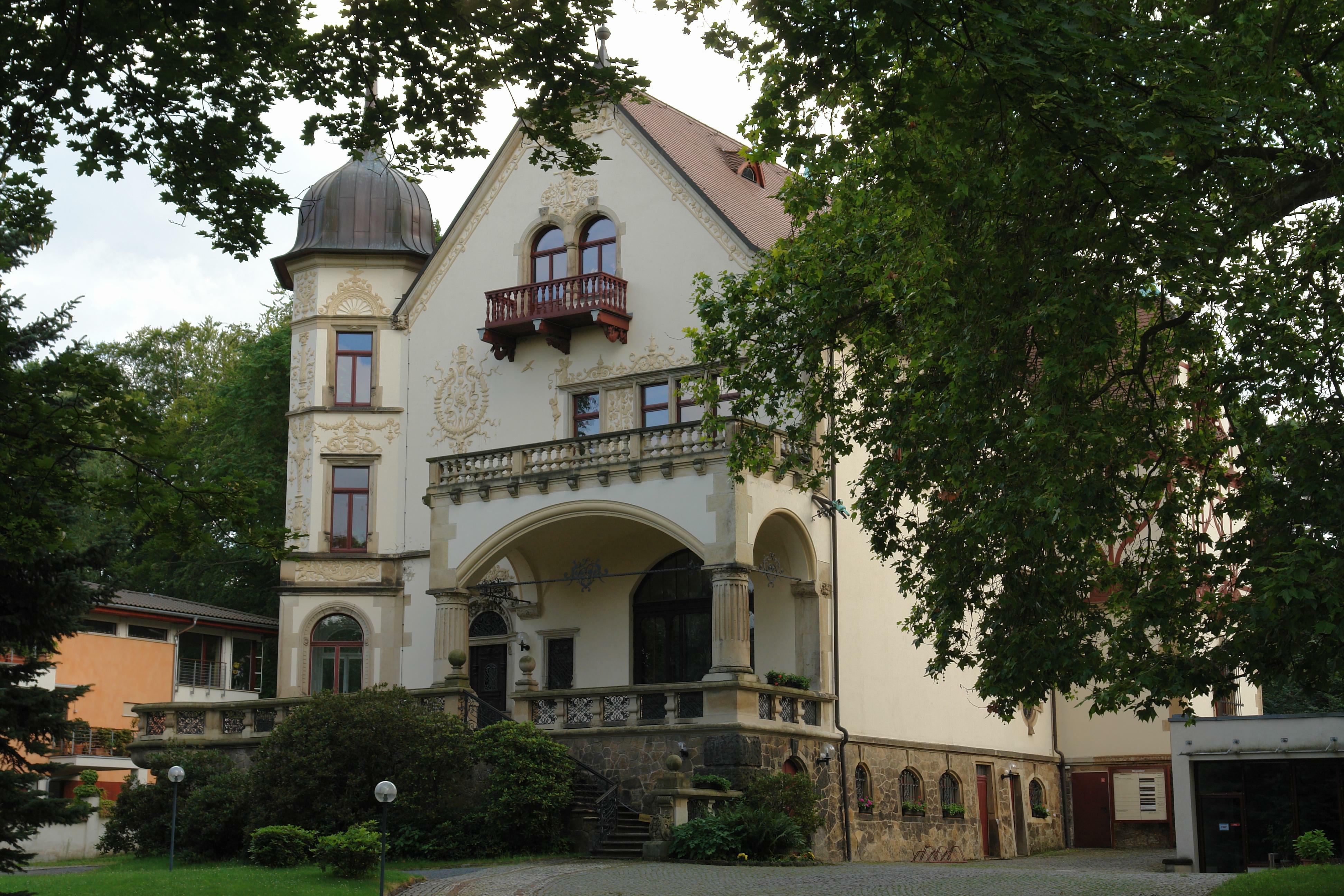 Europäisches Institut für postgraduale Bildung der TU Dresden